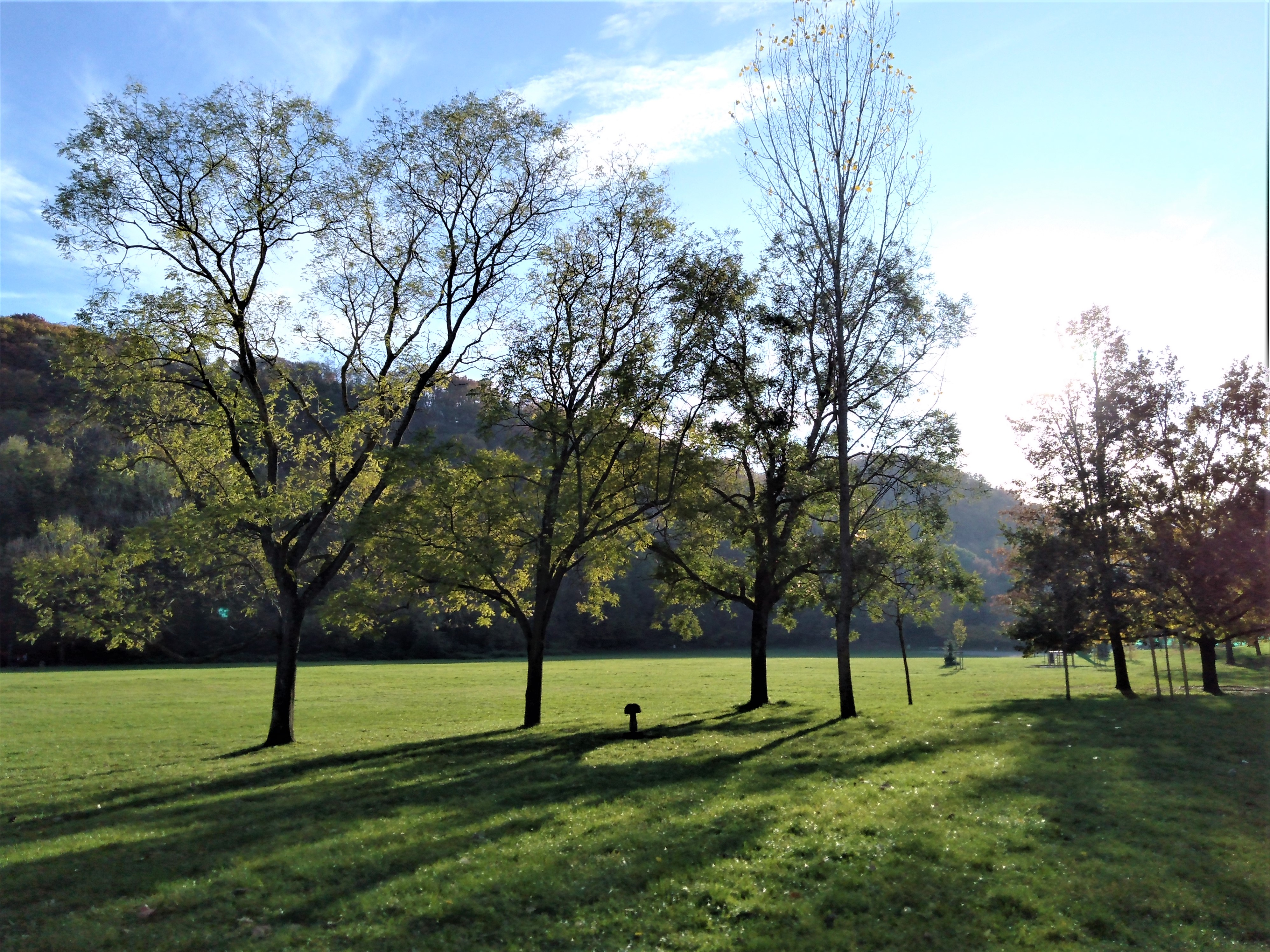 Le parc Robert Buisson à Échirolles